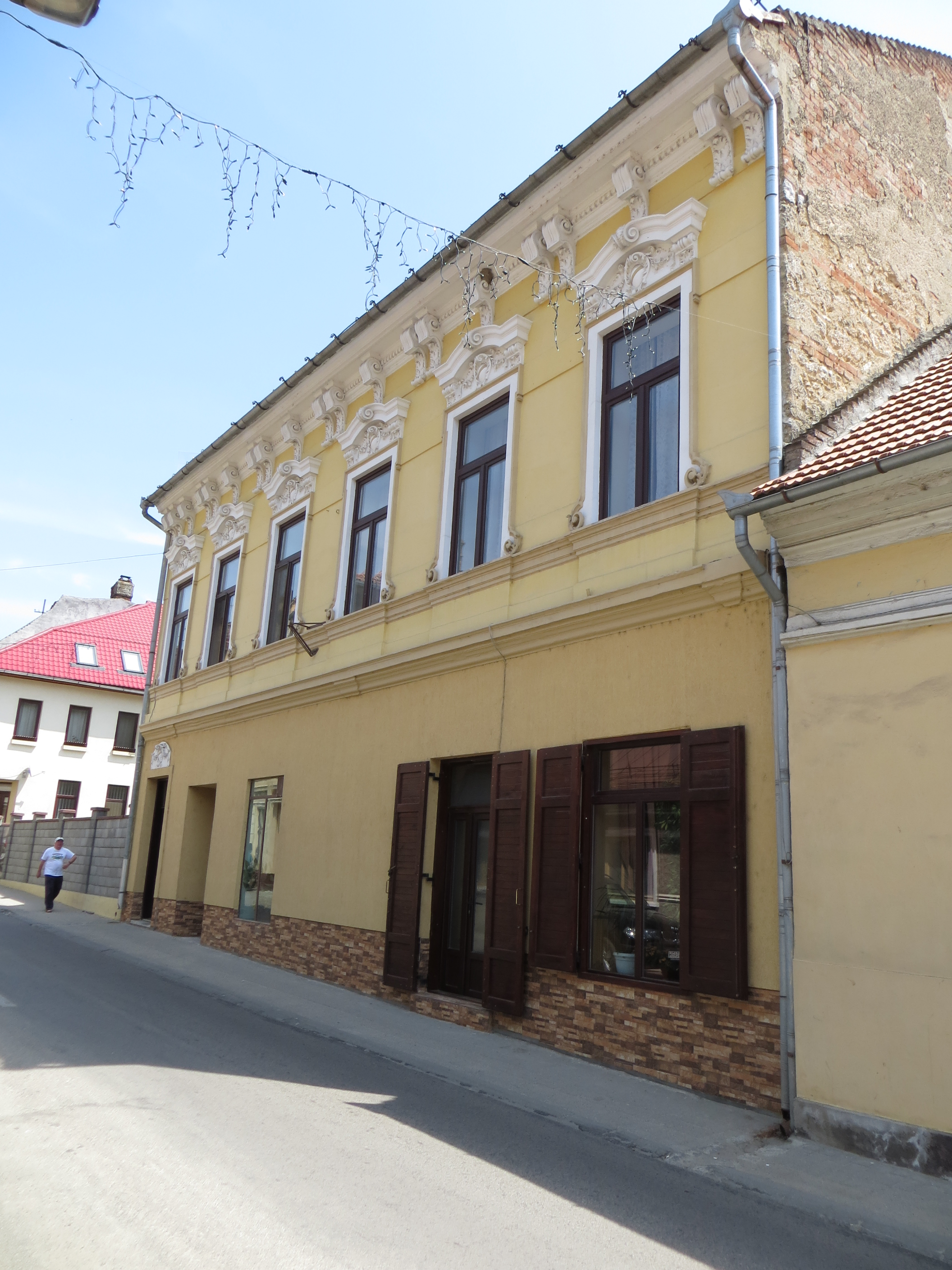 Casa "Mâța Neagră", azi locuințe